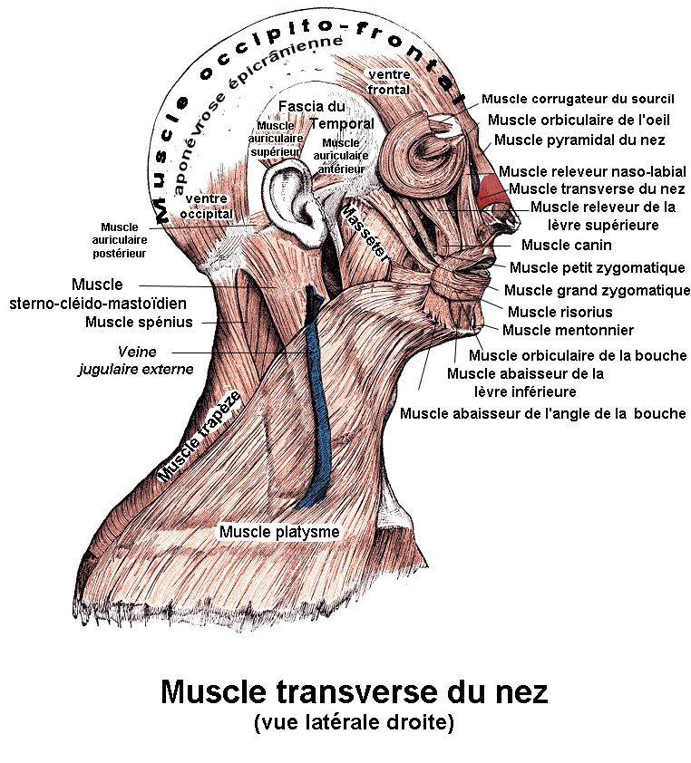 Muscle transversal du nez. Anatomie humaine.